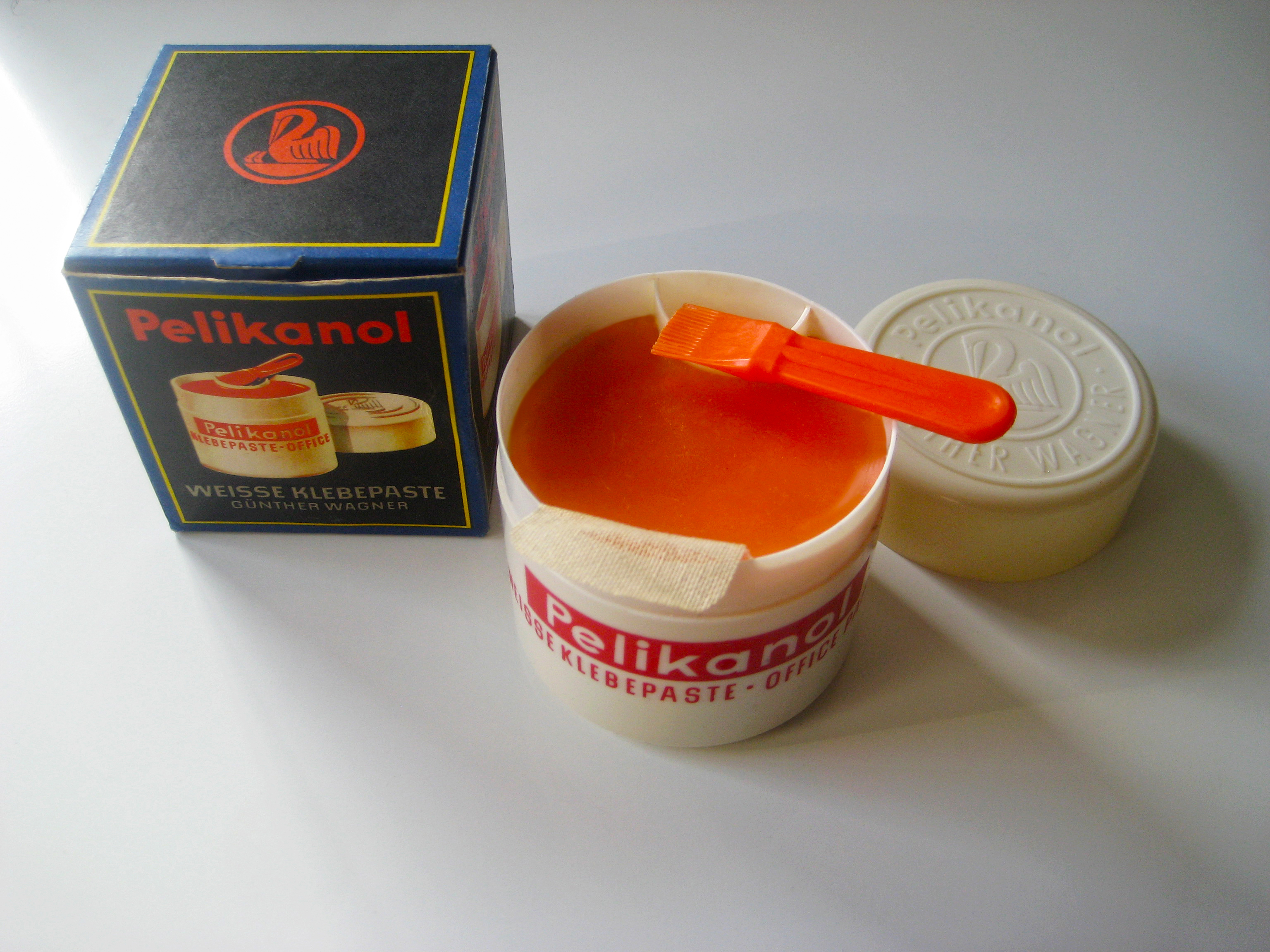 Pelikanol, „Weiße Klebepaste“ für Papier von Günther Wagner, Hannover, Deutschland